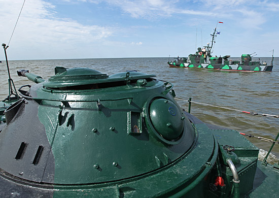 Проекта 1204 "Шмель" - Дивизионом артиллерийских катеров охраны водного района Каспийской флотилии